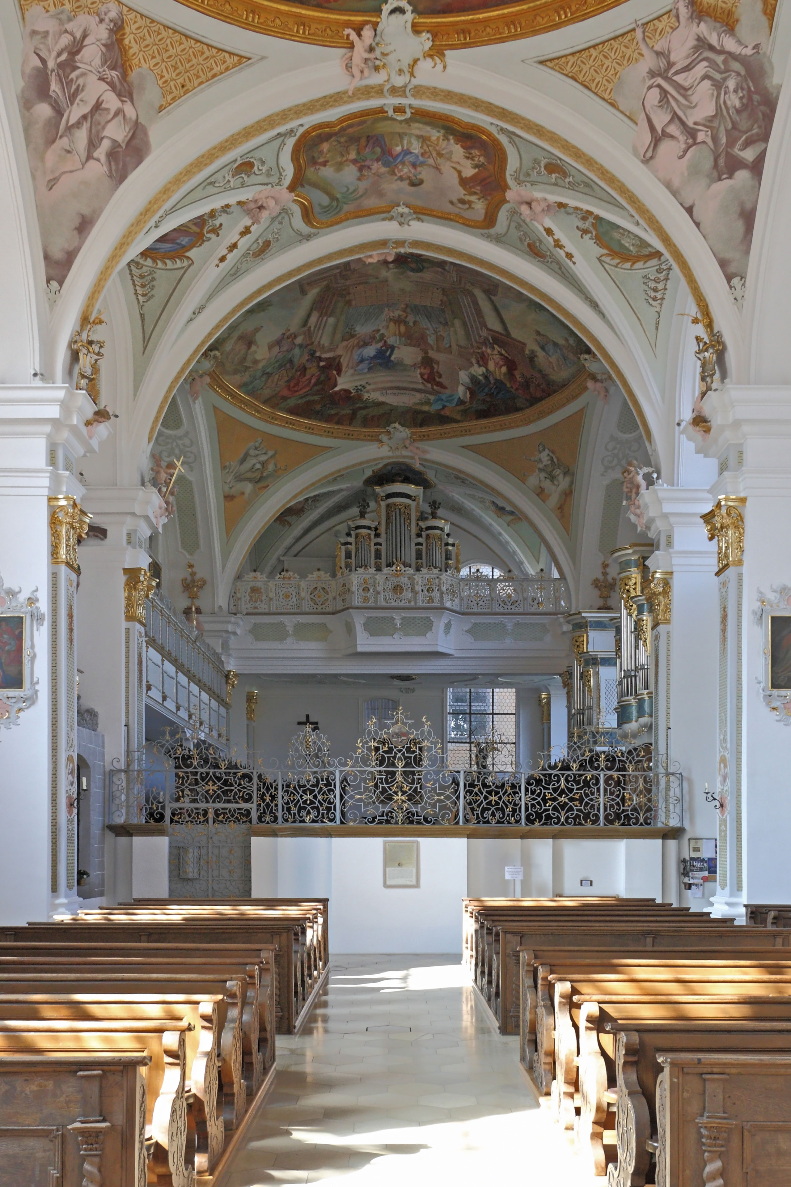 Kirche Mariä Himmelfahrt der Zisterzienserinnen-Abtei Oberschönenfeld in Gessertshausen im Landkreis Augsburg (Bayern); Blick zum Westjoch mit Nonnenchor